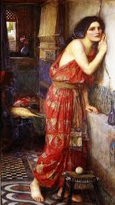 Tisbe, romantikisma pentraĵo de J.W Watterhouse, 1909.